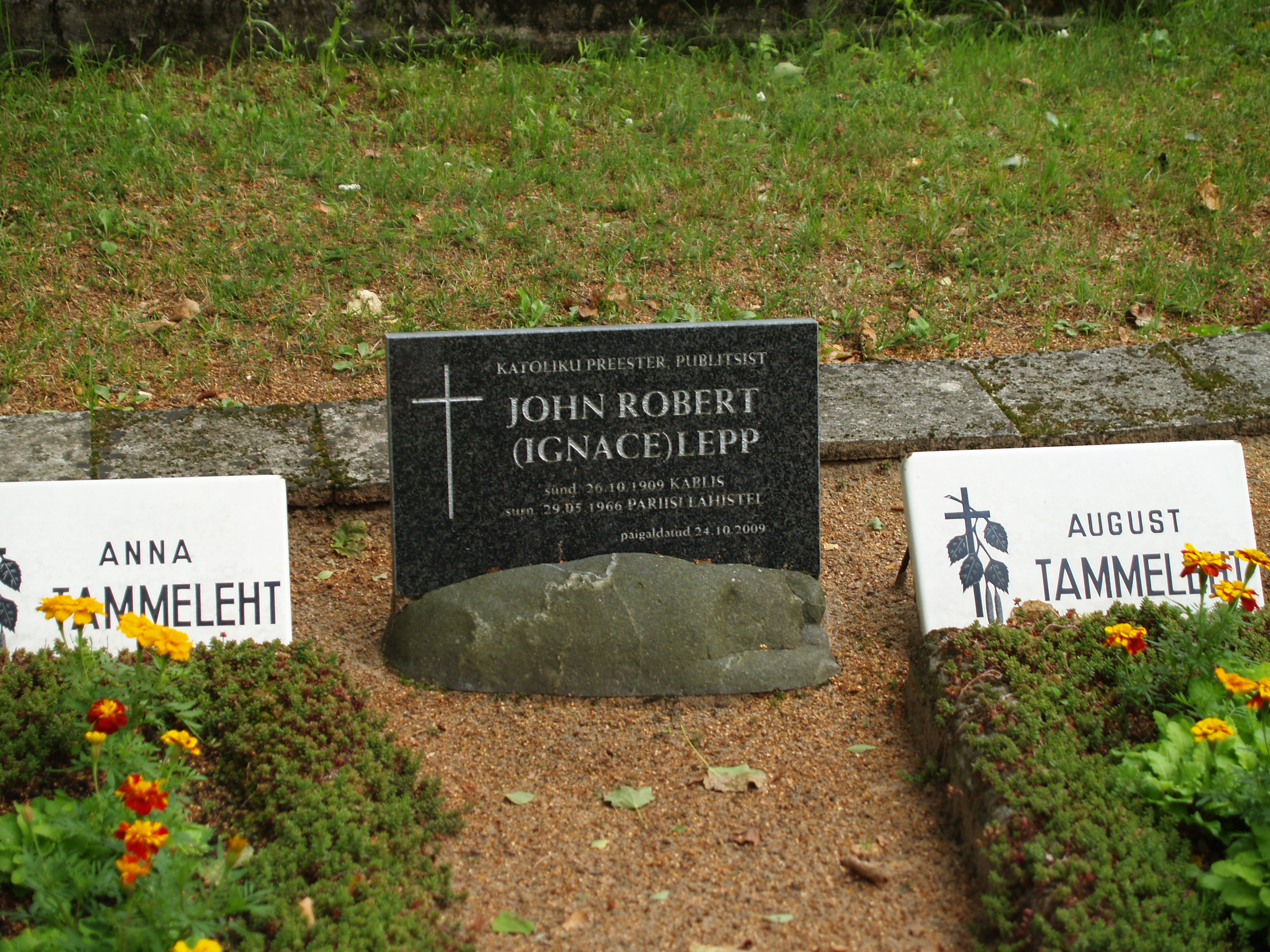 Ignace Lepa mälestustahvel Treimani kalmistul.